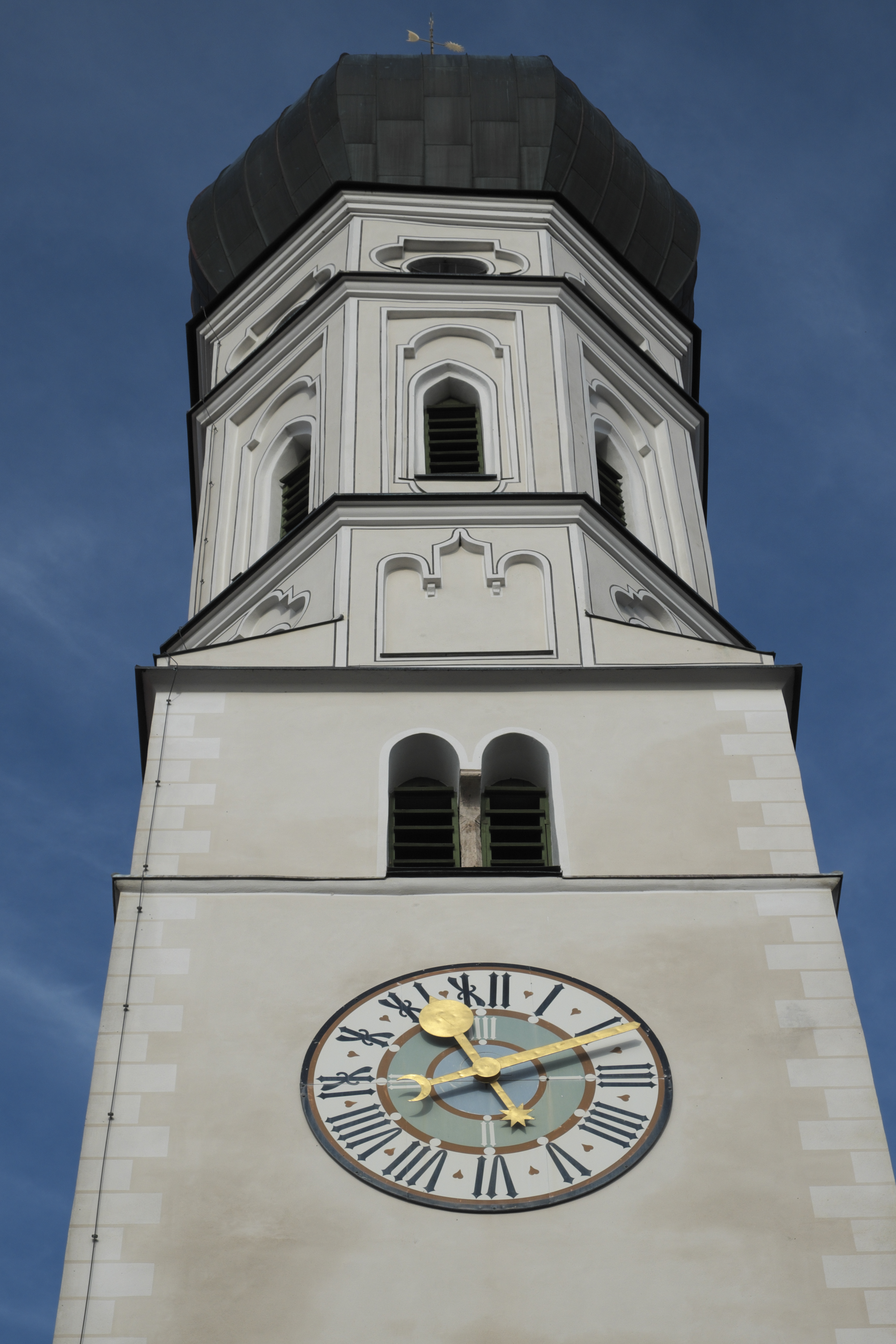 Katholische Pfarrkirche St. Laurentius in Pähl im Landkreis Weilheim-Schongau (Bayern/Deutschland), Glockenturm mit Zwiebelhaube